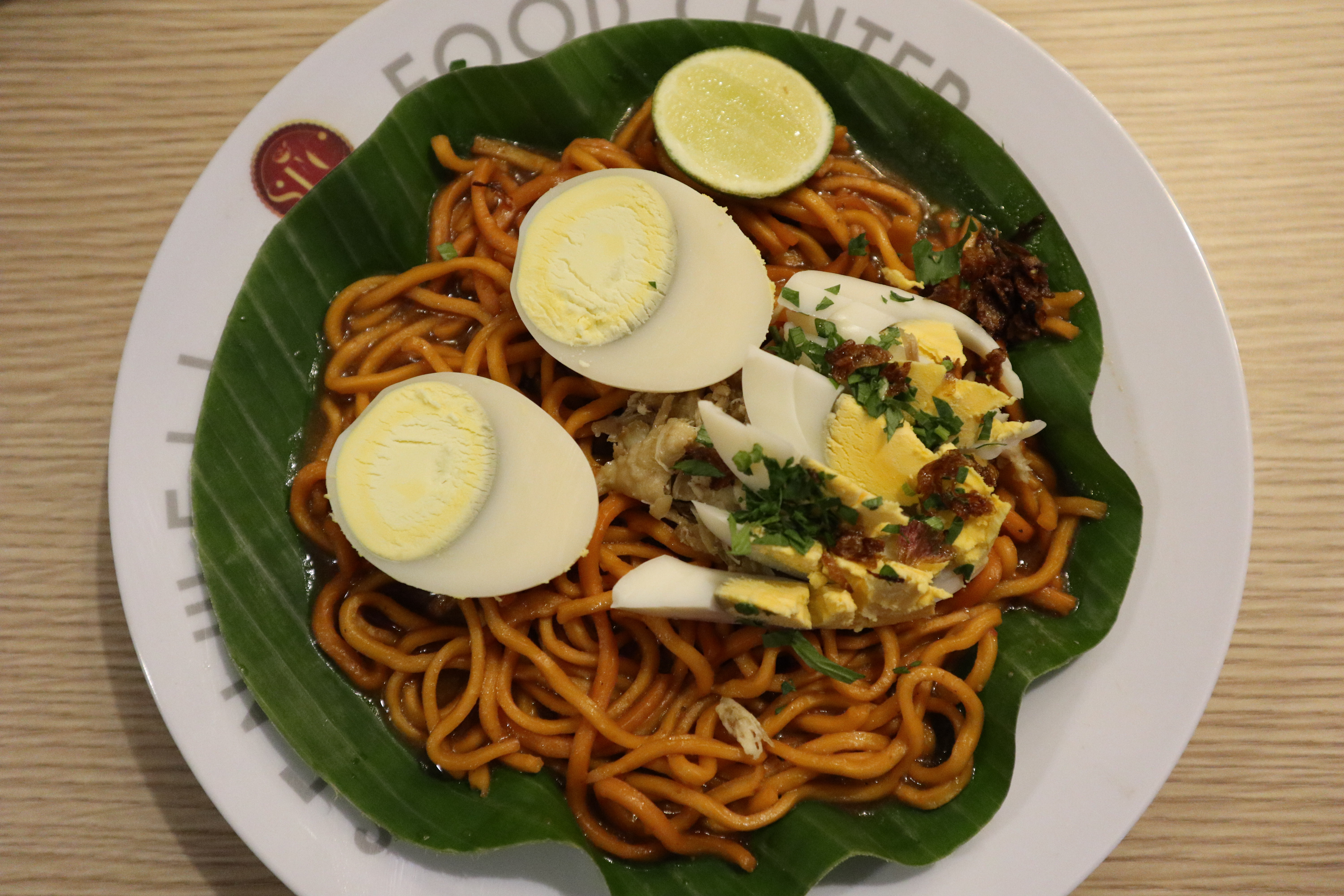 Mie bancir, kuliner khas Banjar yang bersanding dengan lauk telur itik.